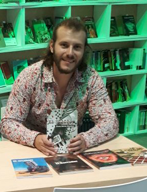 Bruno Adrián Biondani en la Feria del Libro